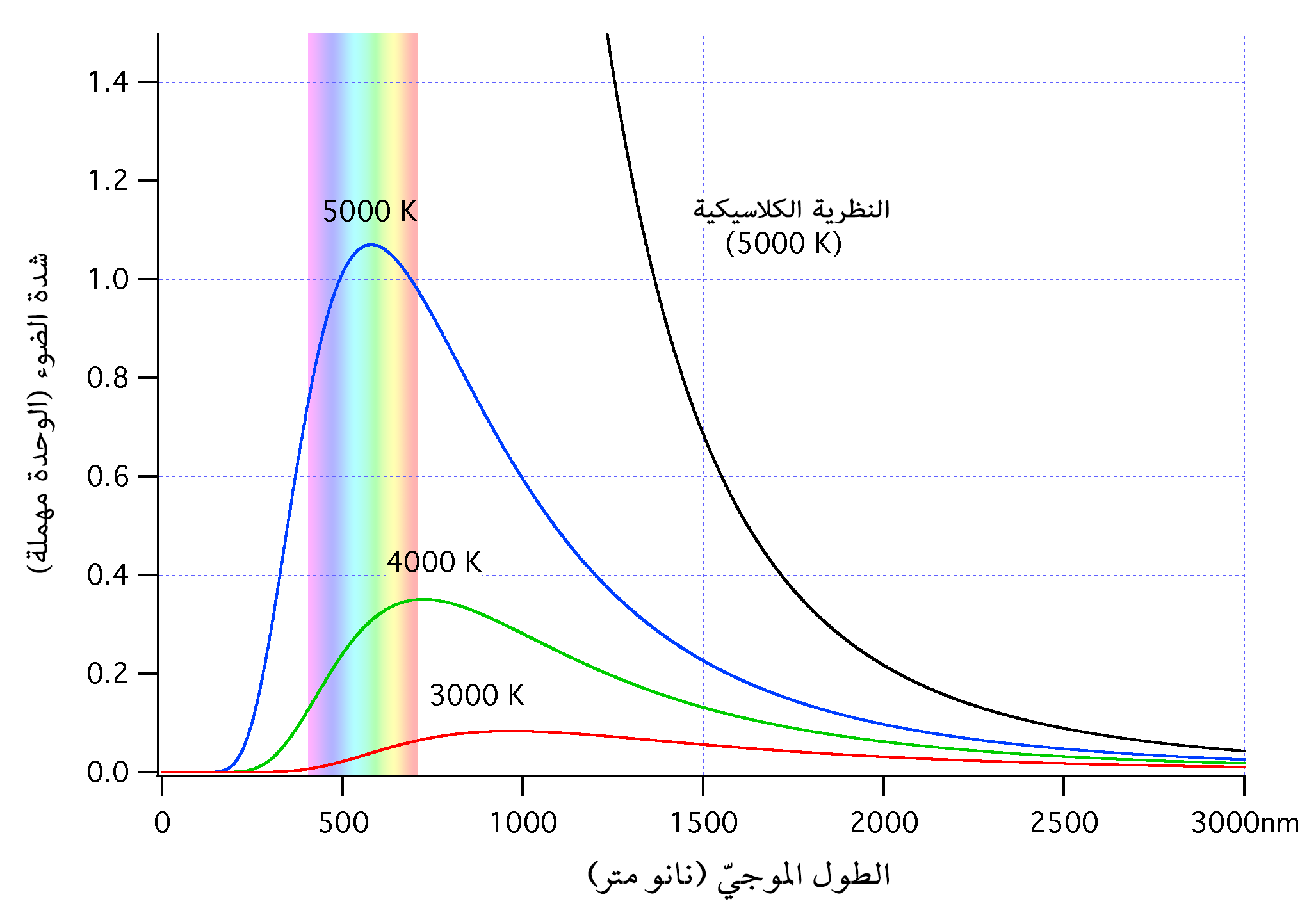 عدة اطياف اجسام سوداء عند درجات حرارة مختلفة